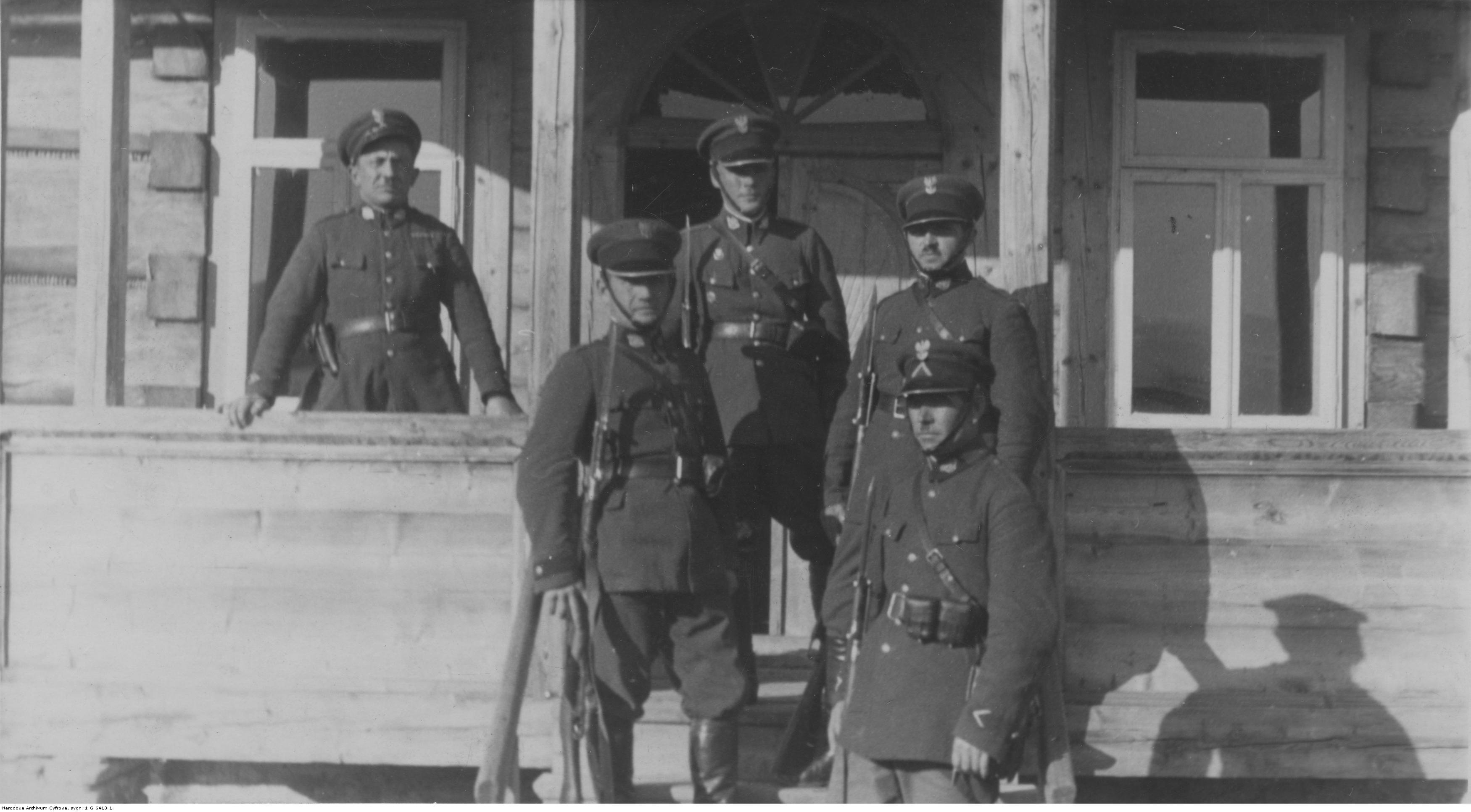 Posterunek Straży Granicznej w Witowie (granica z Czechosłowacją); strażnicy przed budynkiem. Koncern Ilustrowany Kurier Codzienny - Archiwum Ilustracji. Sygnatura: 1-G-6413-1